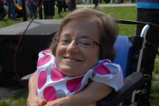 Magdalena Buczek